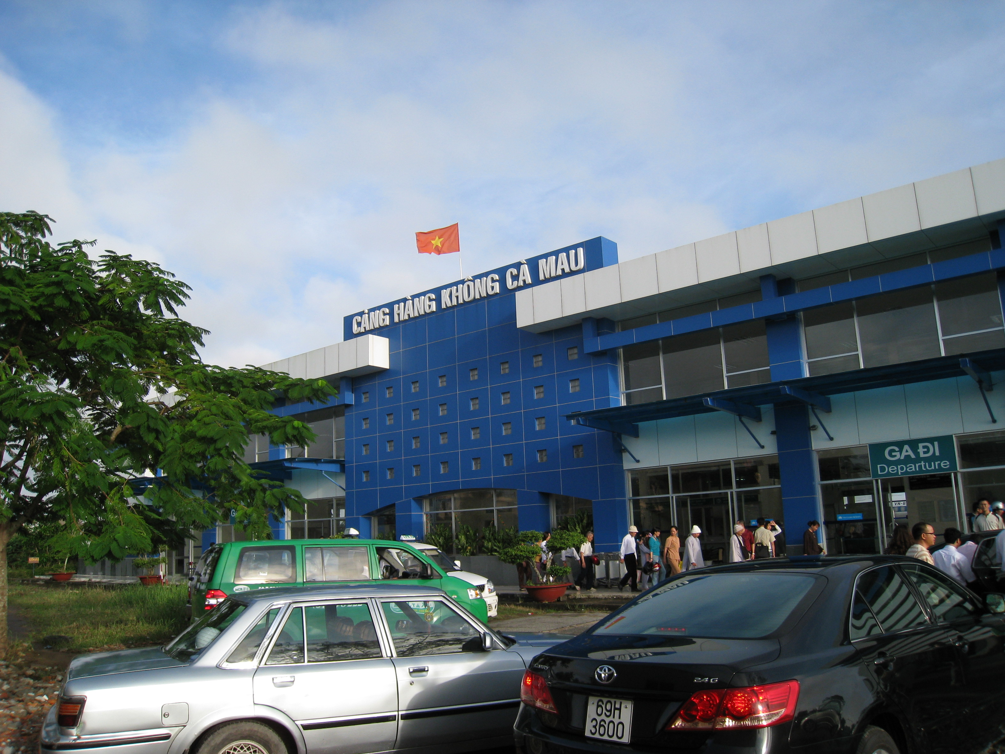 Ca Mau Airport